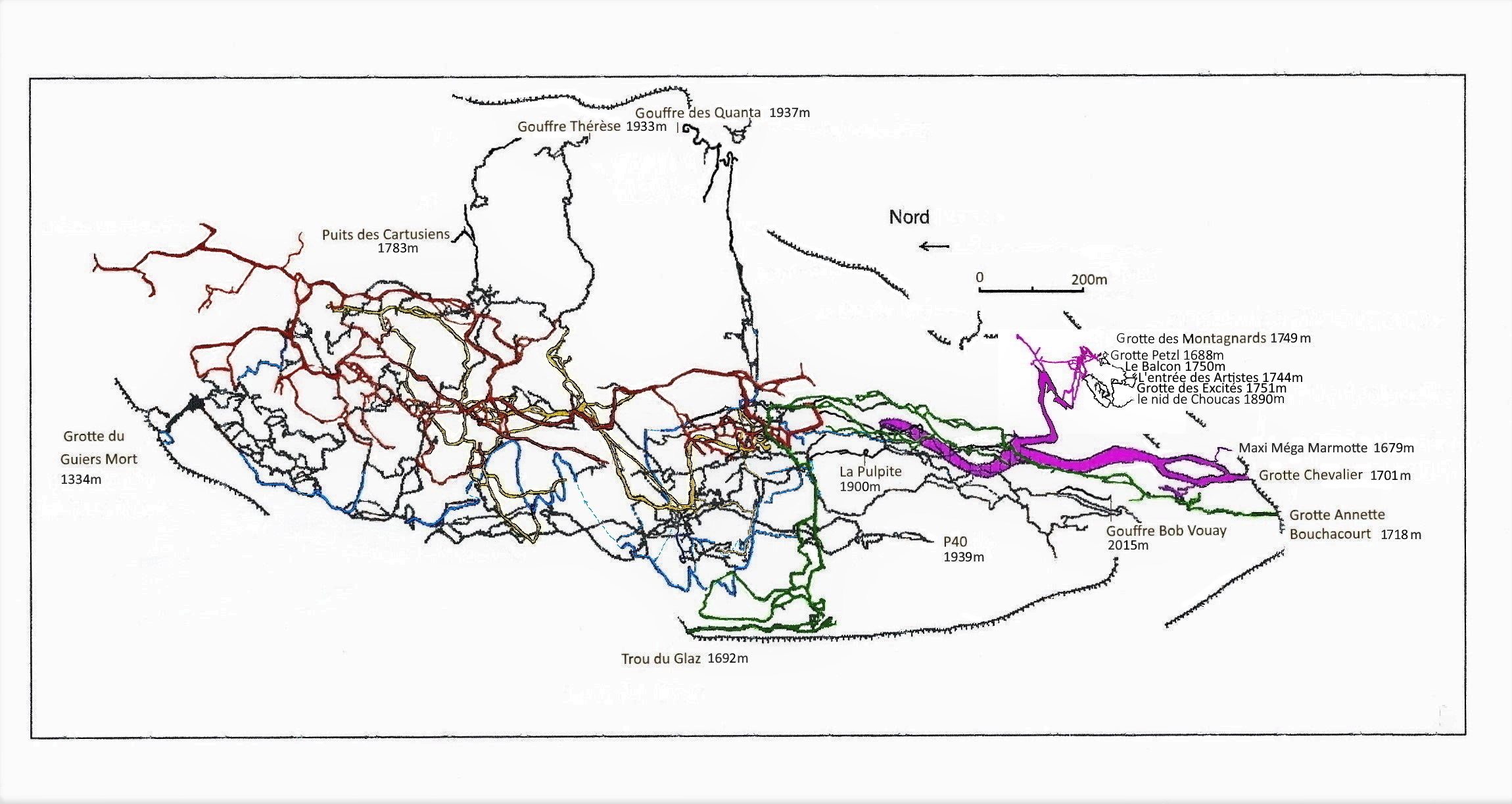 Les couleurs correspondent à différents niveaux ayant comme point 0 le Guiers Mort:le bleu représentant l'actif ,niveau 0 à +100m;le jaune(le métro) représentant le niveau +100 m ;le rouge(Boulevard des Tritons) représentant le niveau +200m;le vert(Glaz-Annette) le niveau +350m.Le dénivelé entre l'entrée la plus haute ,le gouffre Bob Vouay(2022m) et la grotte du Guiers Mort est de 690 métres.